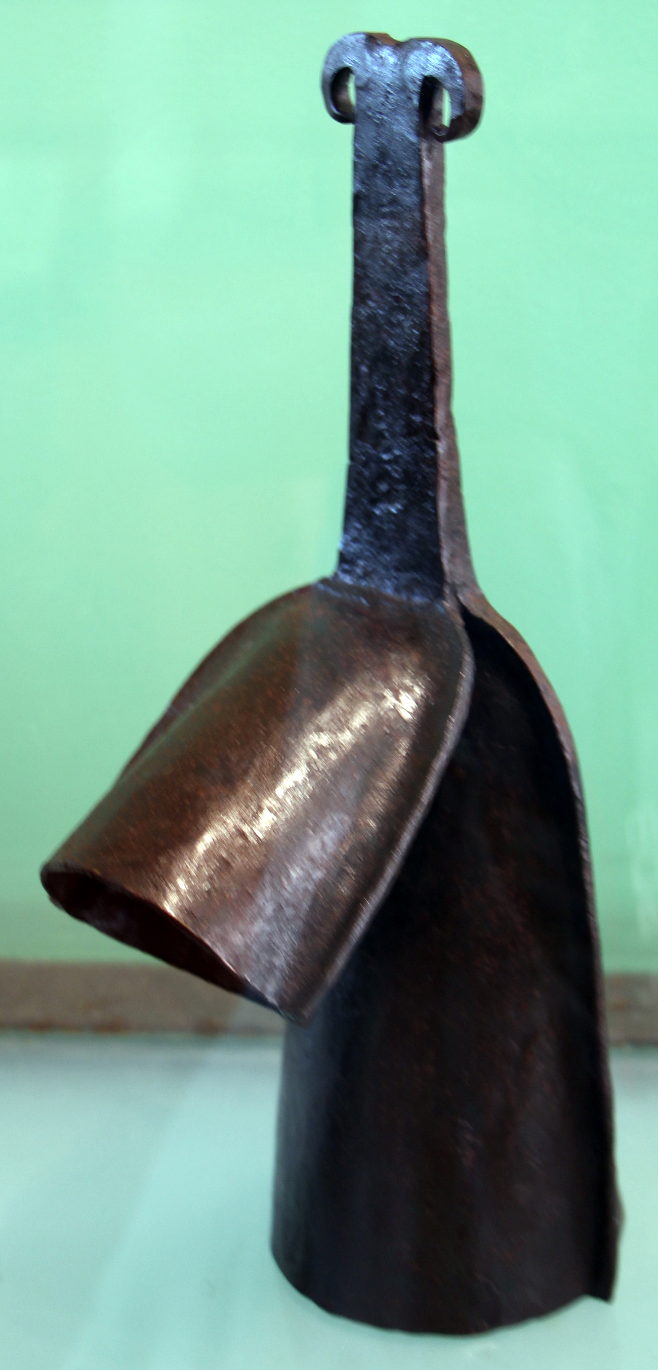 Museu Afro-Brasileiro, Salvador